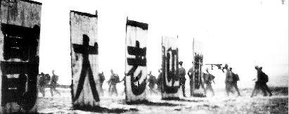 1949年3月，第18兵团热烈欢迎各路援军参加太原战役